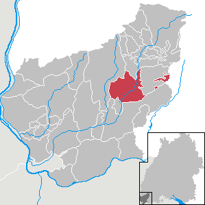 Zell im Wiesental, Landkreis Lörrach, Baden-Württemberg